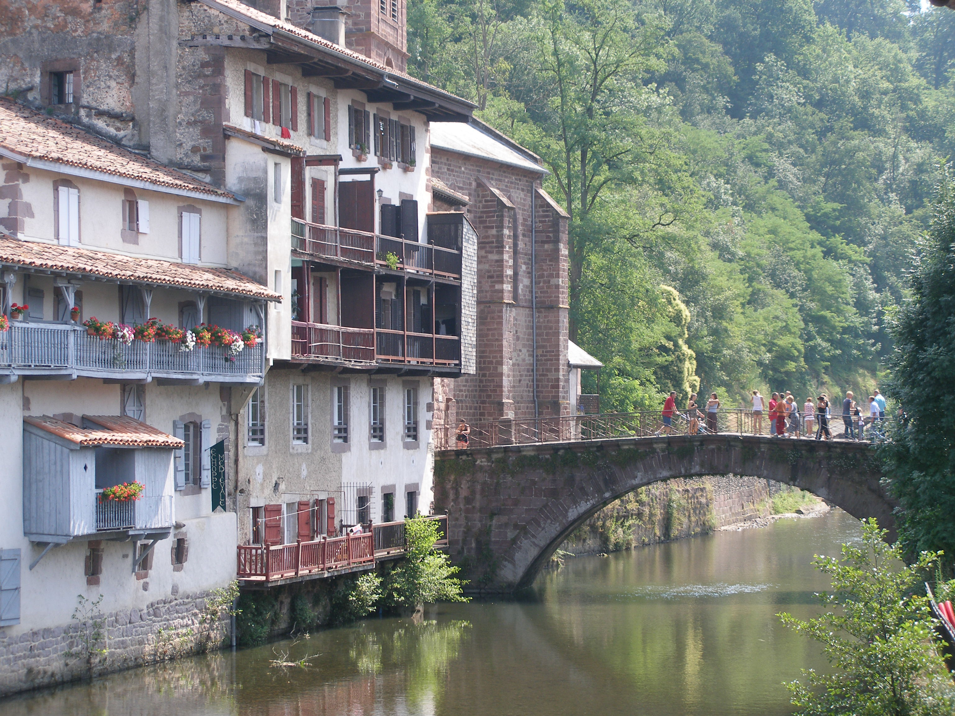 San Juan de Pie de Puerto